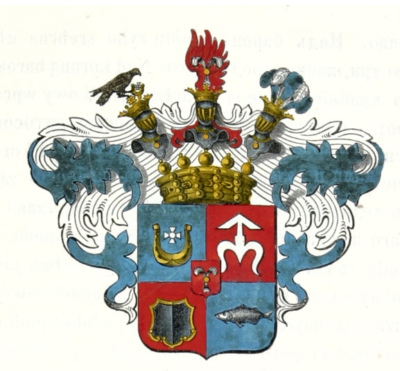 Horoch Baron